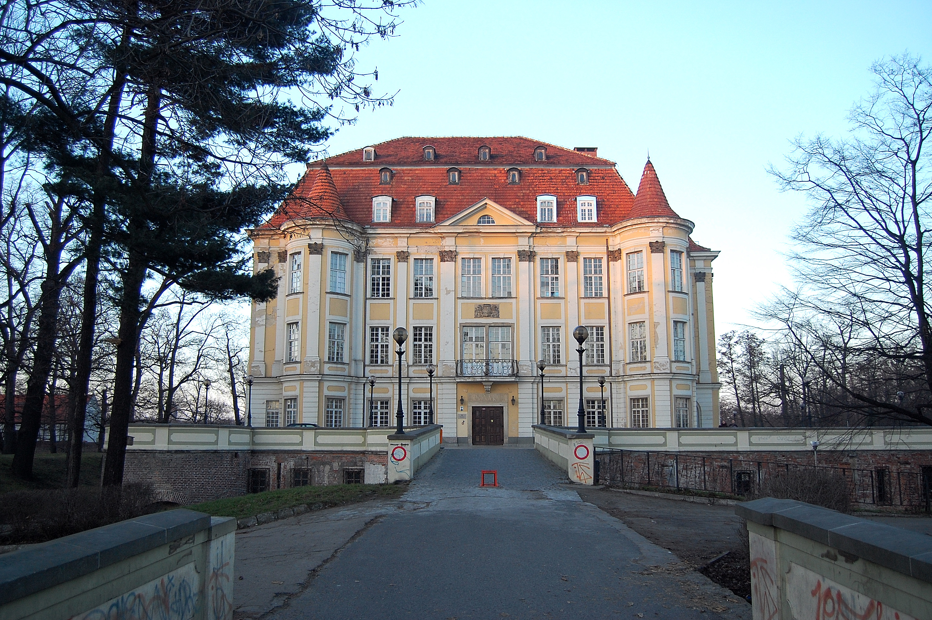 Zamek w Leśnicy, autor zdjęcia: Paweł Łąk.